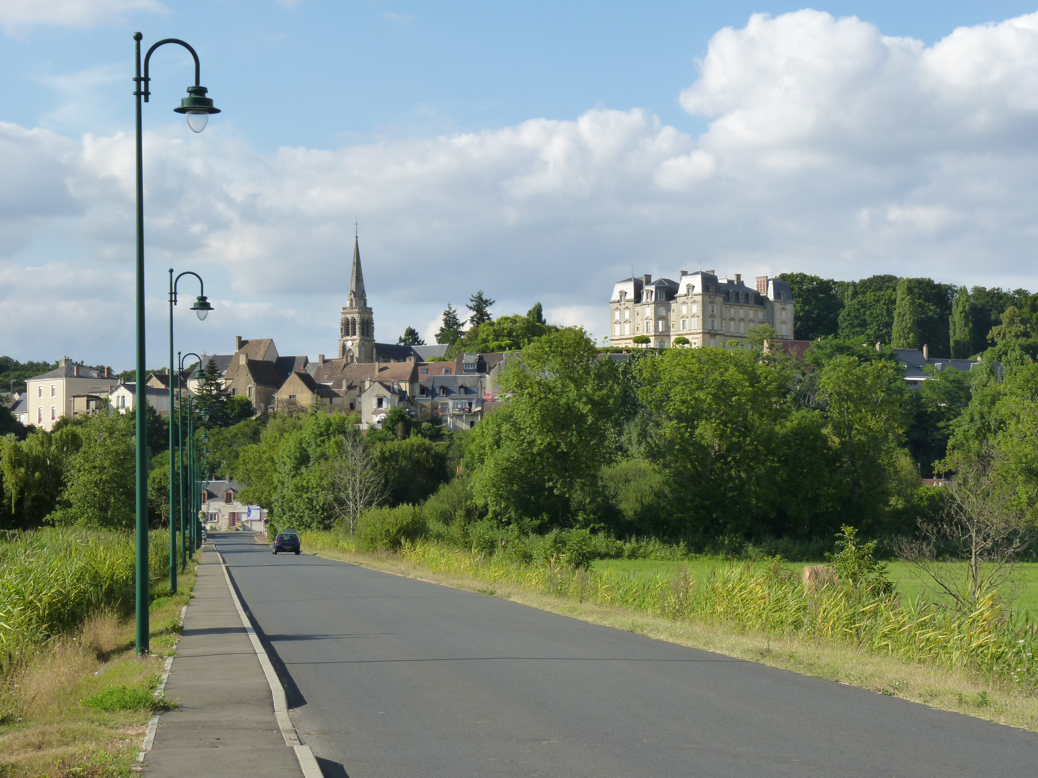 Montfort-le-Gesnois - Entrée du bourg